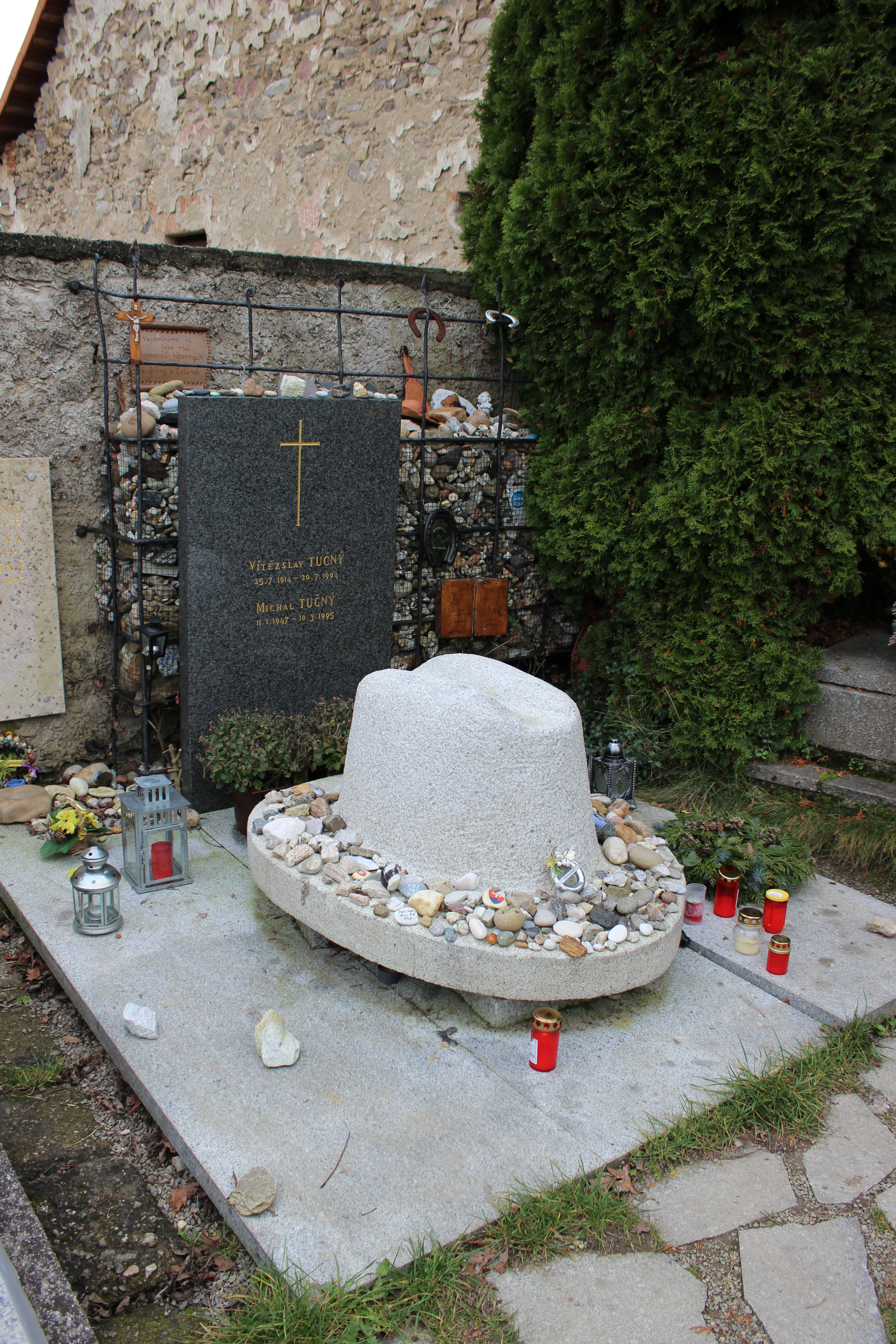 Místní hřbitov. Hrob Michala Tučného. Hoštice (okres Strakonice). Česká republika.